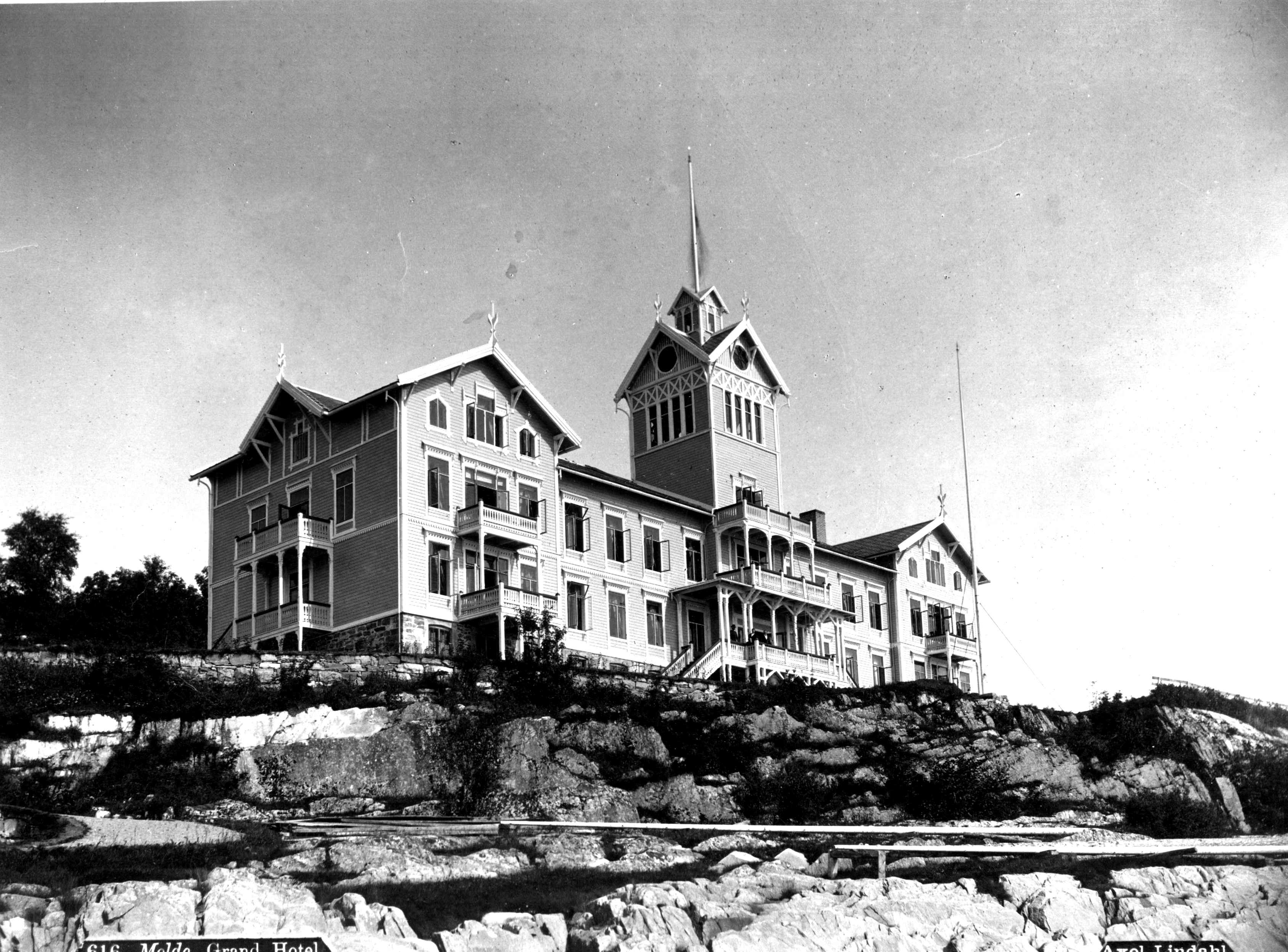 Grand Hotel, Molde.